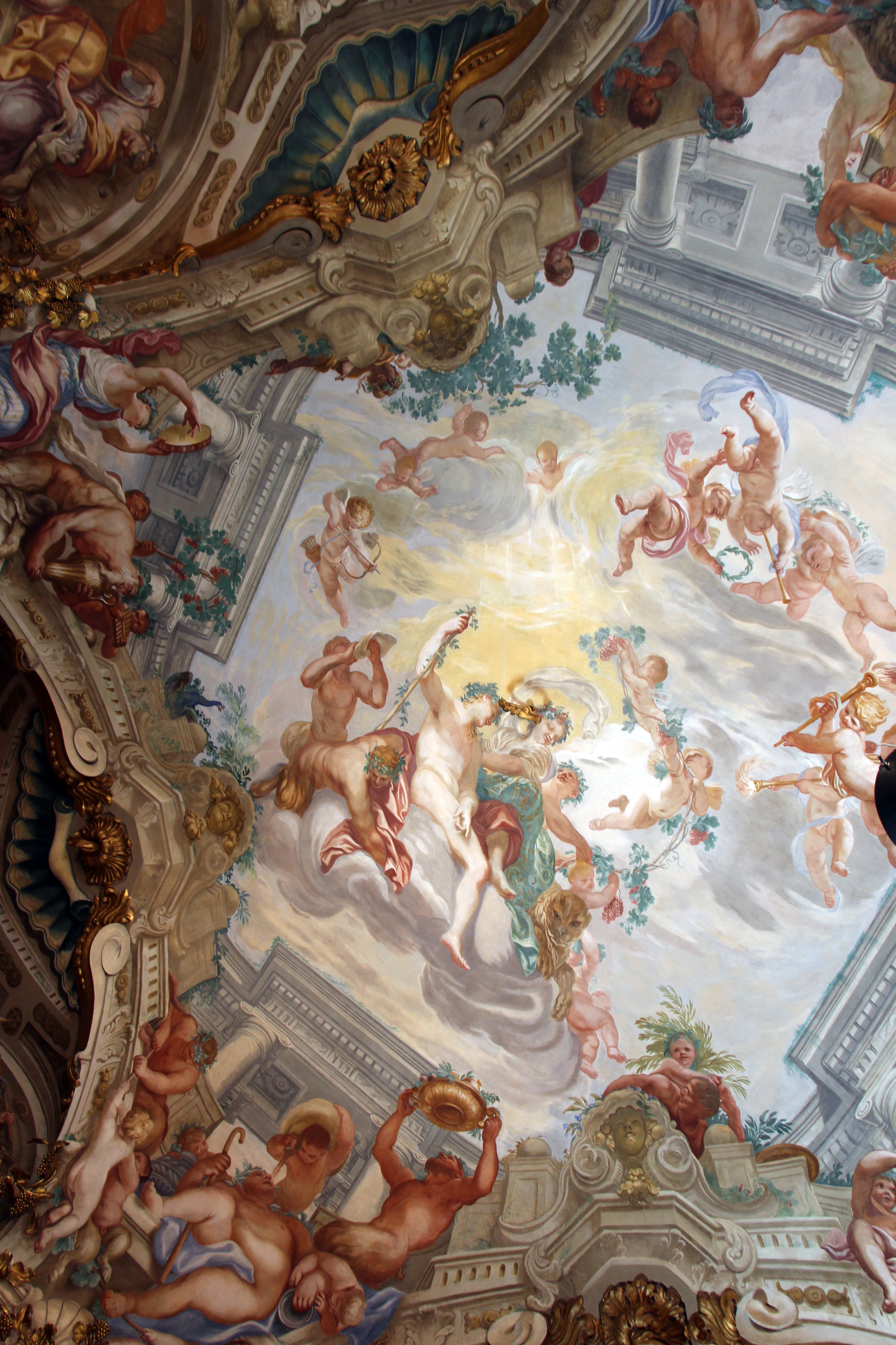 Palazzo Rosso - Musei di Strada Nuova The making of this document was supported by Wikimedia CH. (Submit your project!) For all the files concerned, please see the category Supported by Wikimedia CH. This is a photo of a monument which is part of cultural heritage of Italy.